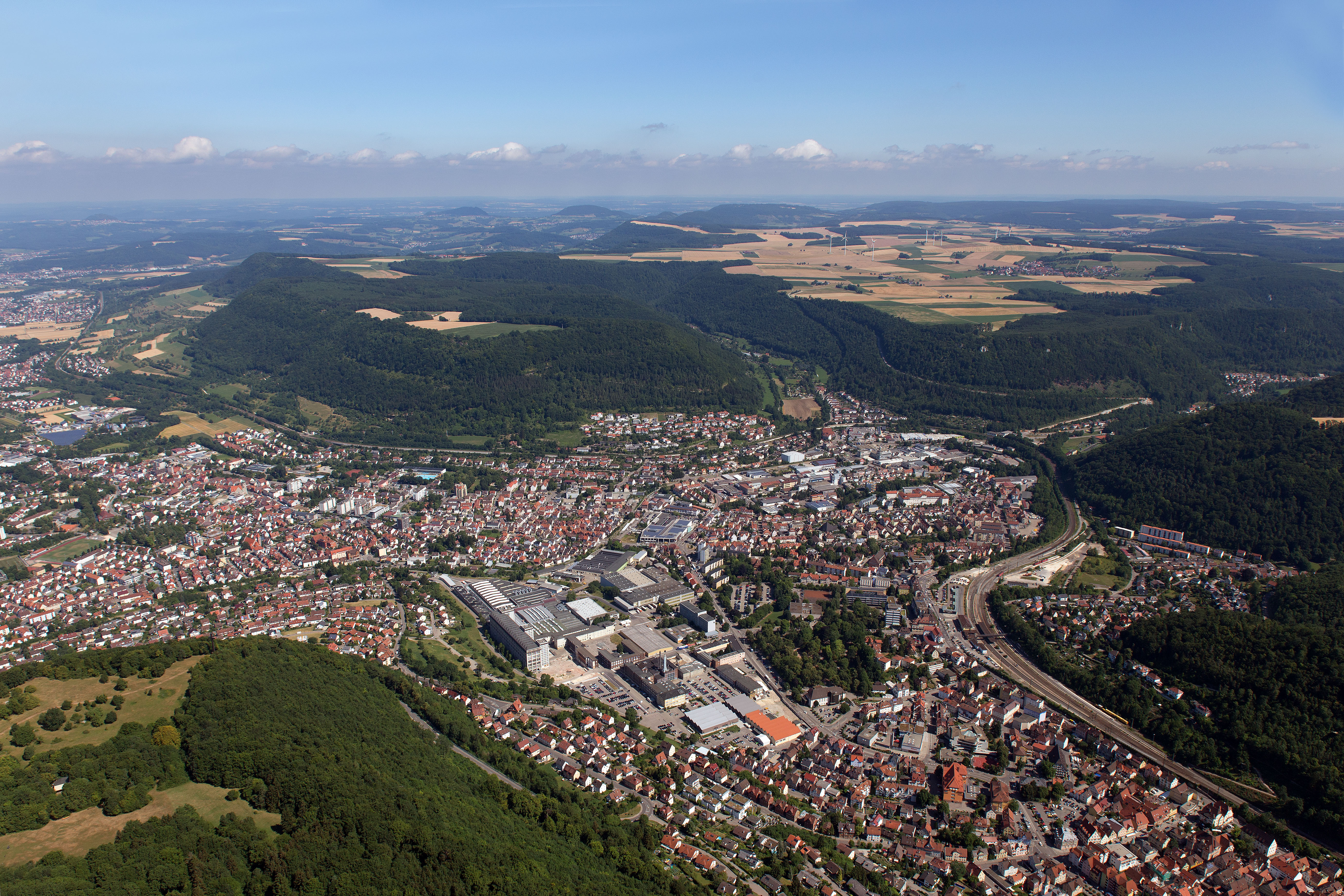 Luftbild_WMF_Geislingen